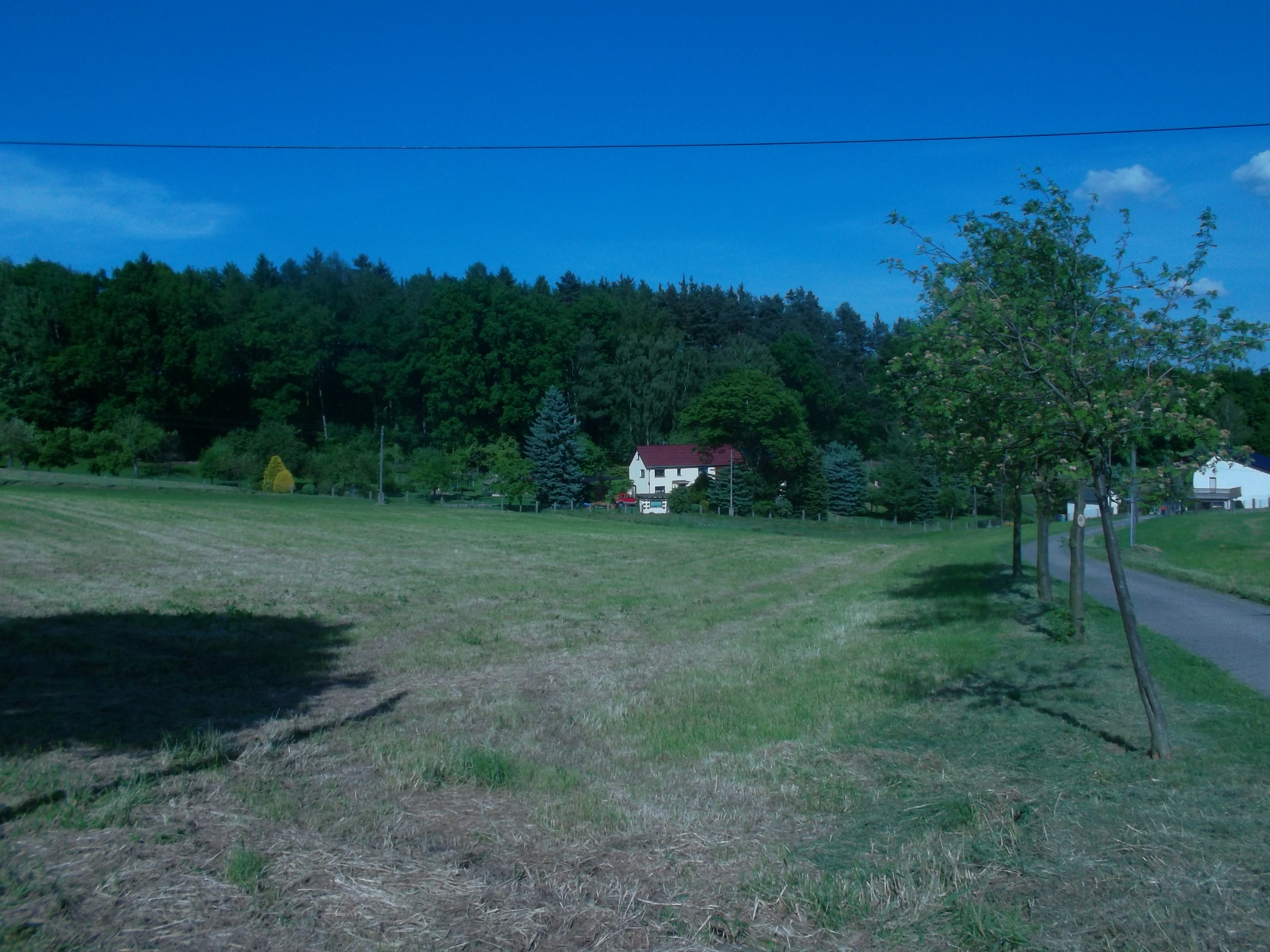 Ortseingang Sonnenberg